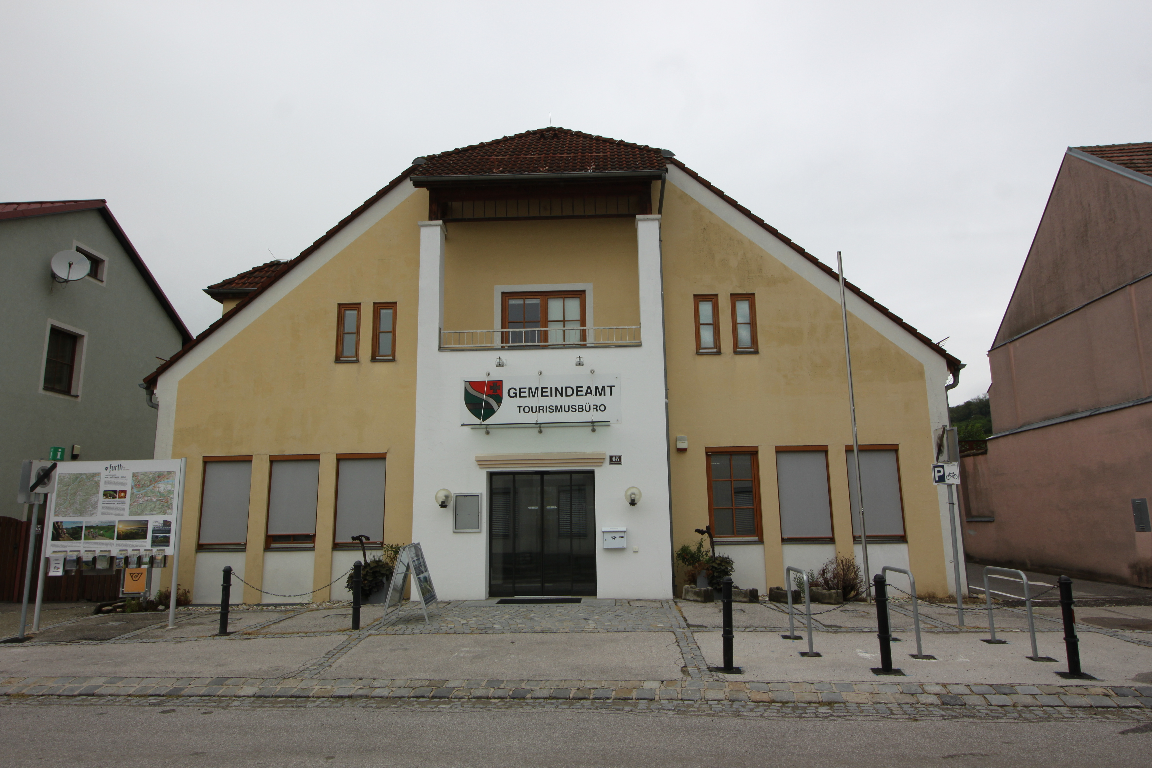 Neues Gemeindeamt in Furth bei Göttweig auf Obere Landstraße 65